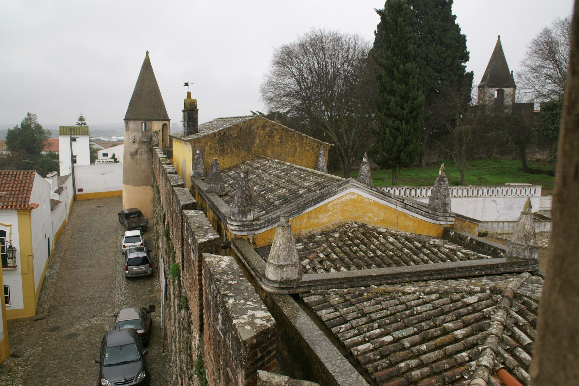 Castle in Viana do Alentejo, Portugal